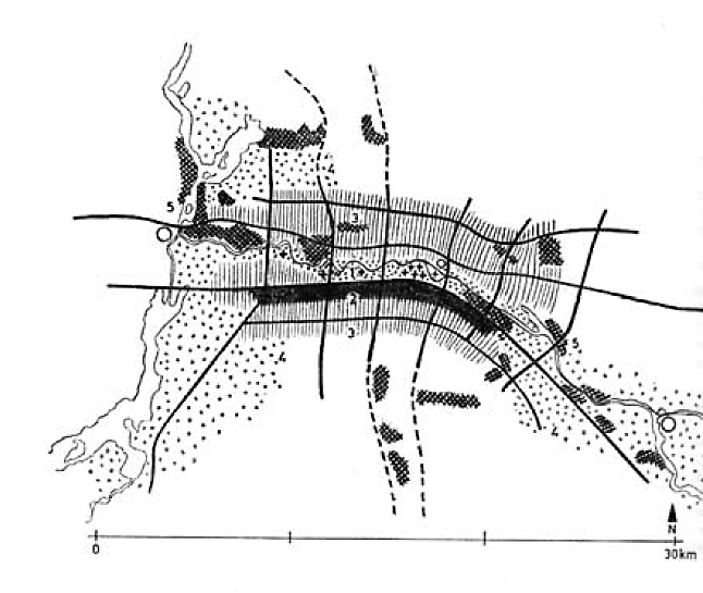 Abstrahierte Abbildung des Kollektivplans vom Planungskollektiv 1946